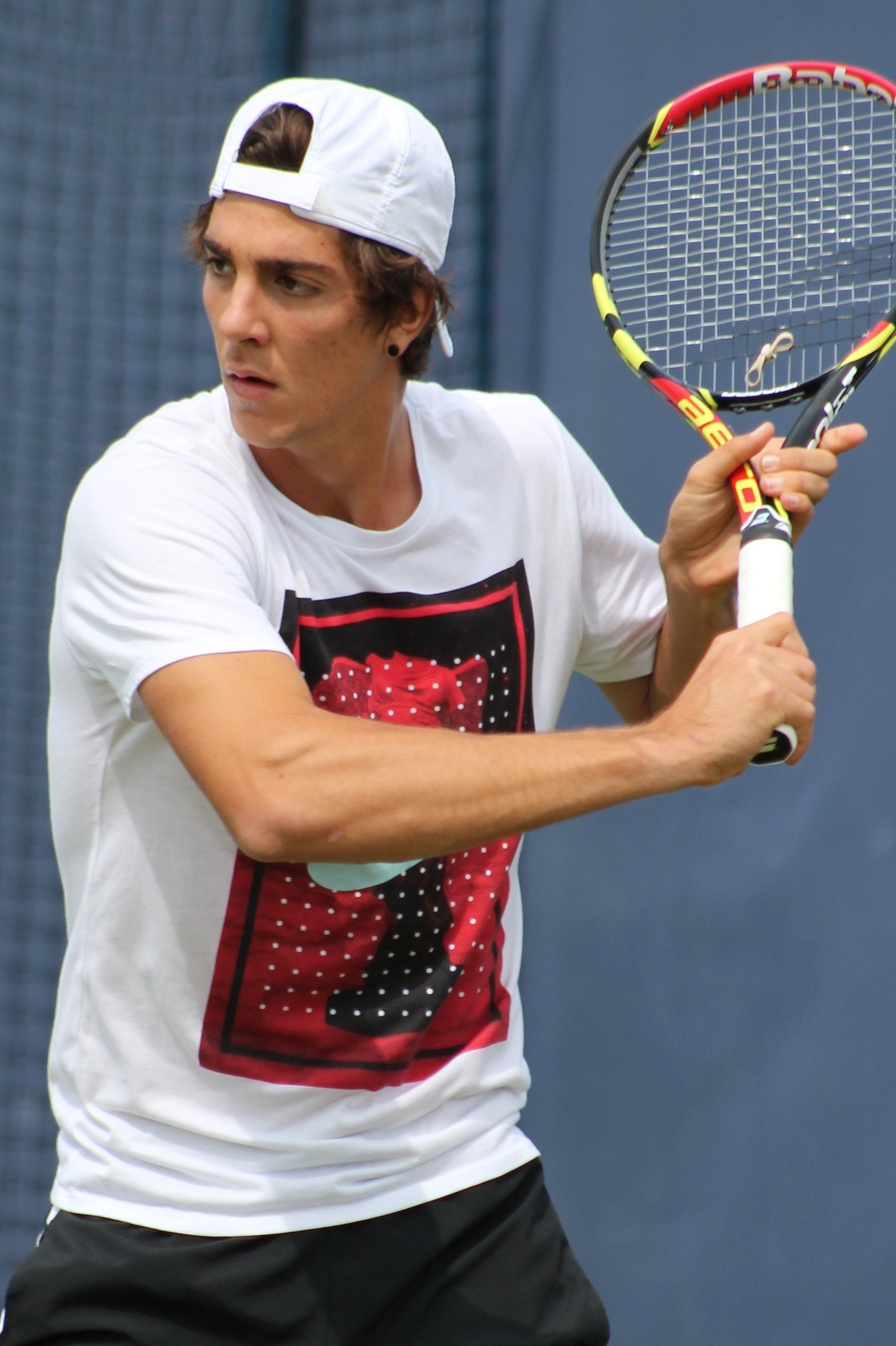 Kokkinakis QC15 (13)